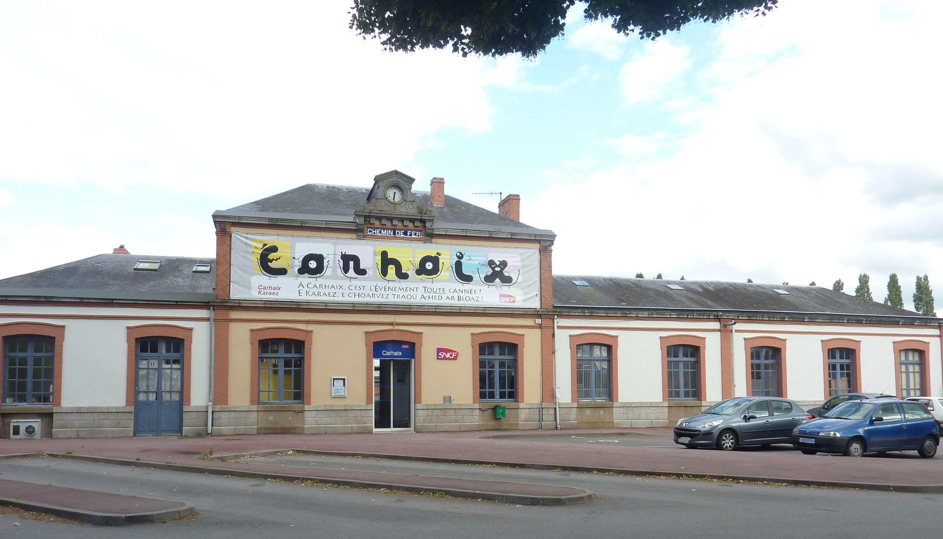 Carhaix-Plouguer : la gare de Carhaix